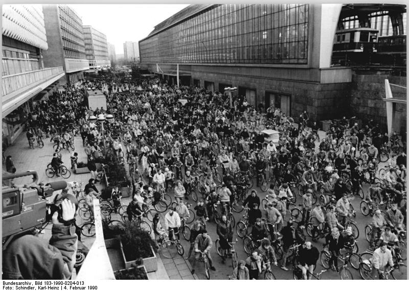 ADN-ZB Schindler 4.2.90 Berlin: 2. Fahrraddemo- Mehrere tausend Berliner starteten am Sonntagnachmittag zu ihrer zweiten Demonstration durch Berlin. Grüne Liga, Neues Forum und die Grüne Partei hatten zu dieser Veranstaltung aufgerufen. Künftig soll an jedem ersten Sonntag im Monat eine solche Demonstration stattfinden. Forderung der Teilnehmer der 2. Fahrraddemo: Tempo 30 in Wohngebieten und markierte Fahrradstreifen auf den Fahrbahnen!